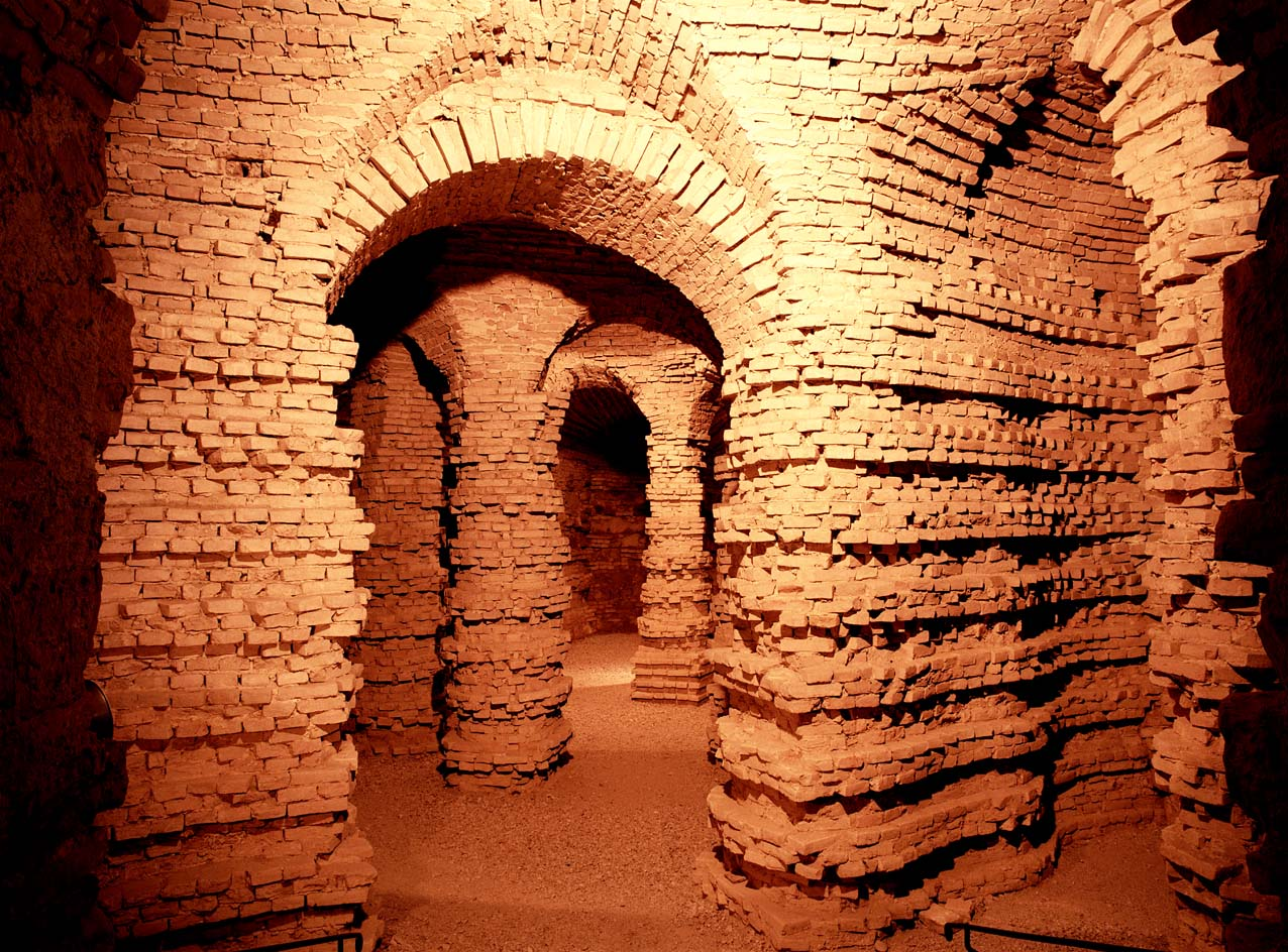 Grotte im Schloss Neugebäude